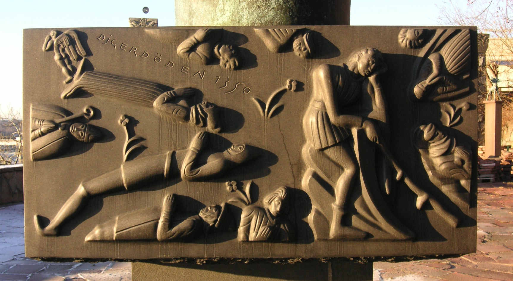 Carl Milles "Folkungabrunnen", detalj av relief på bassängen